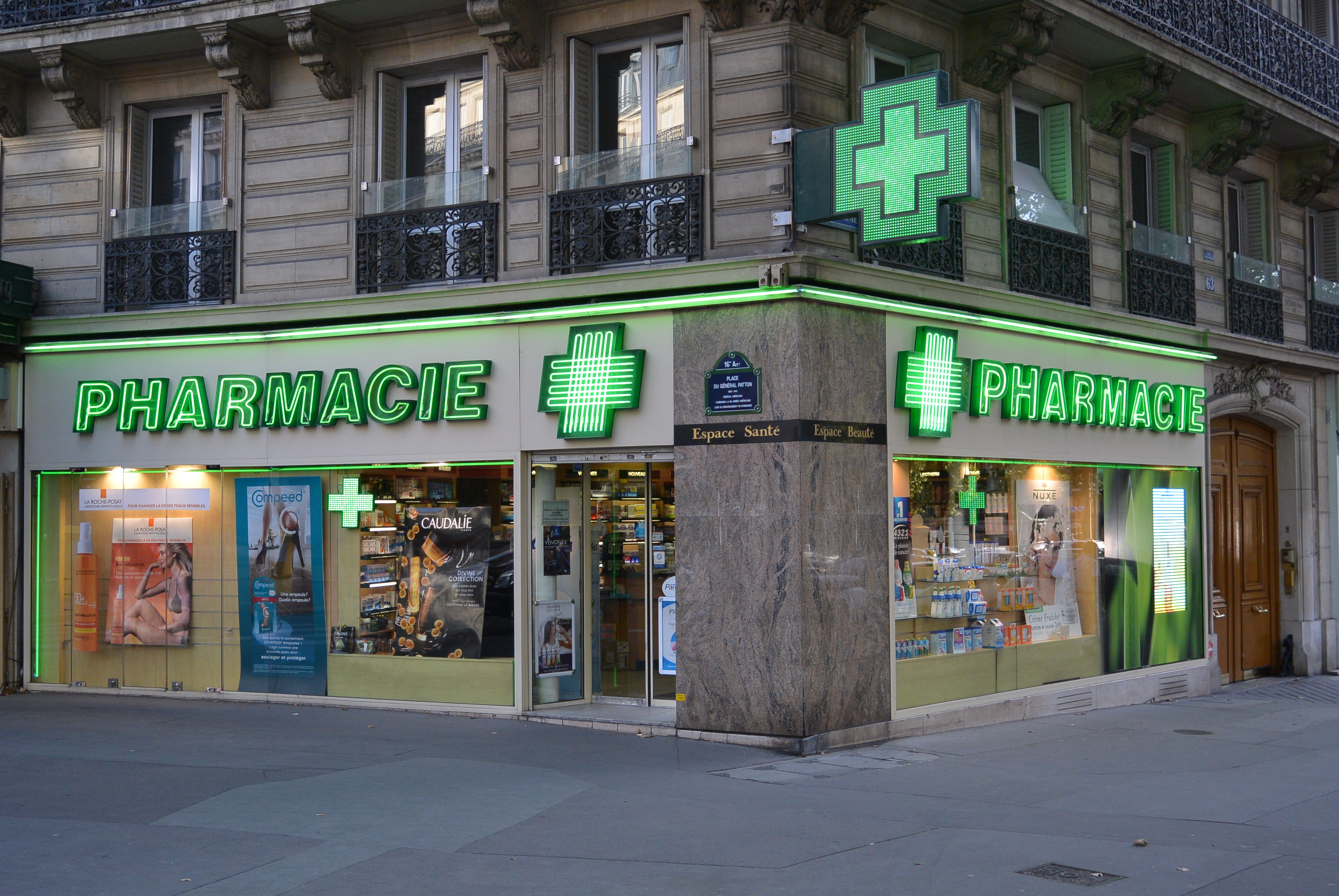 Pharmacie, Place du Général-Patton, Paris.